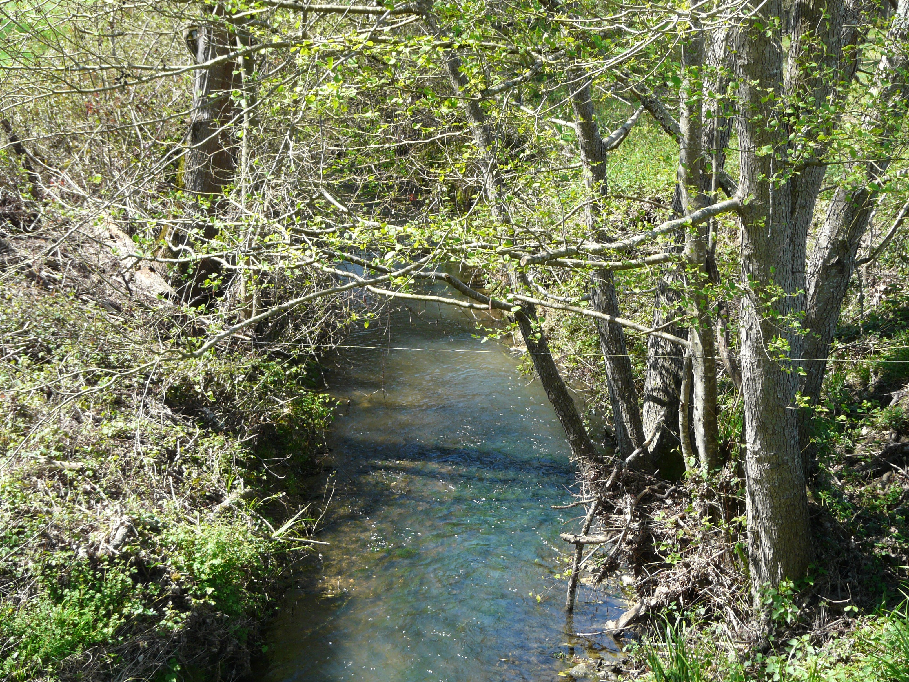 L'Estrop en aval du pont de la route départementale 11, en limites de Vélines (à gauche) et de Montazeau (à droite), Dordogne, France.